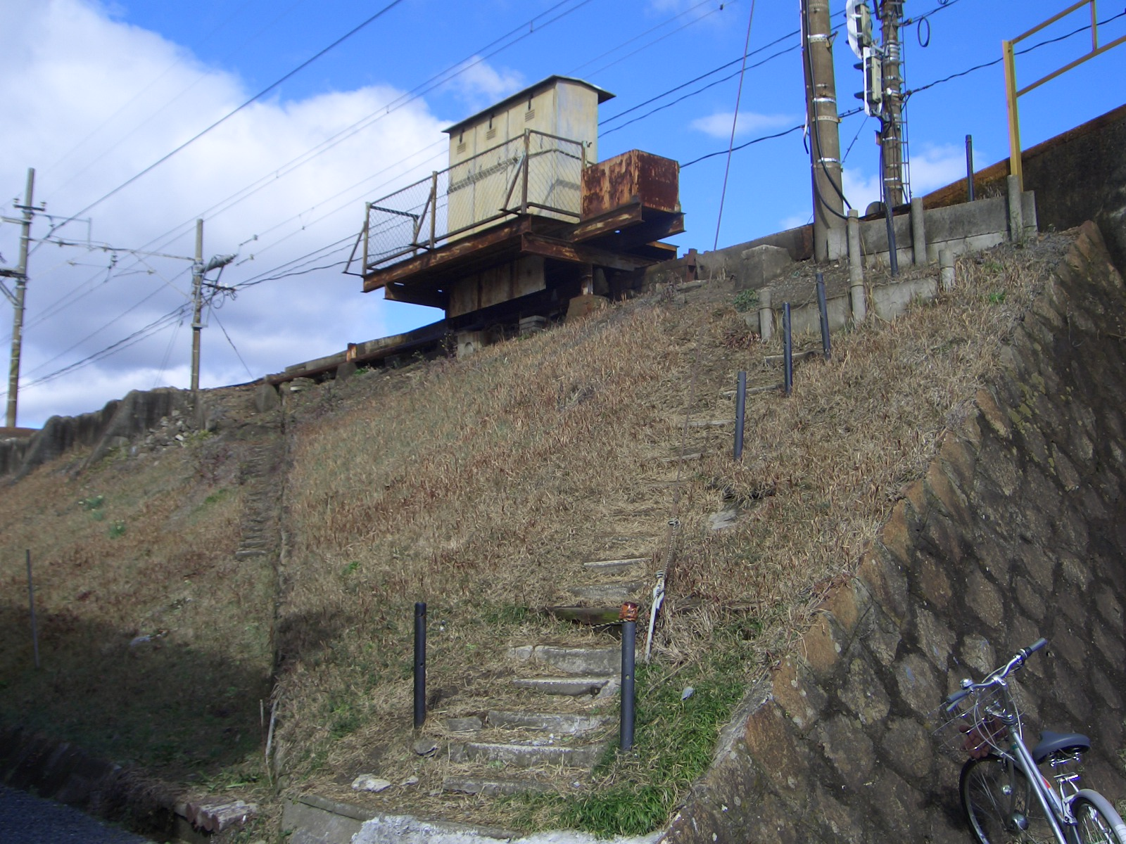 三岐鉄道三岐線三岐朝明信号場(旧三岐朝明駅)